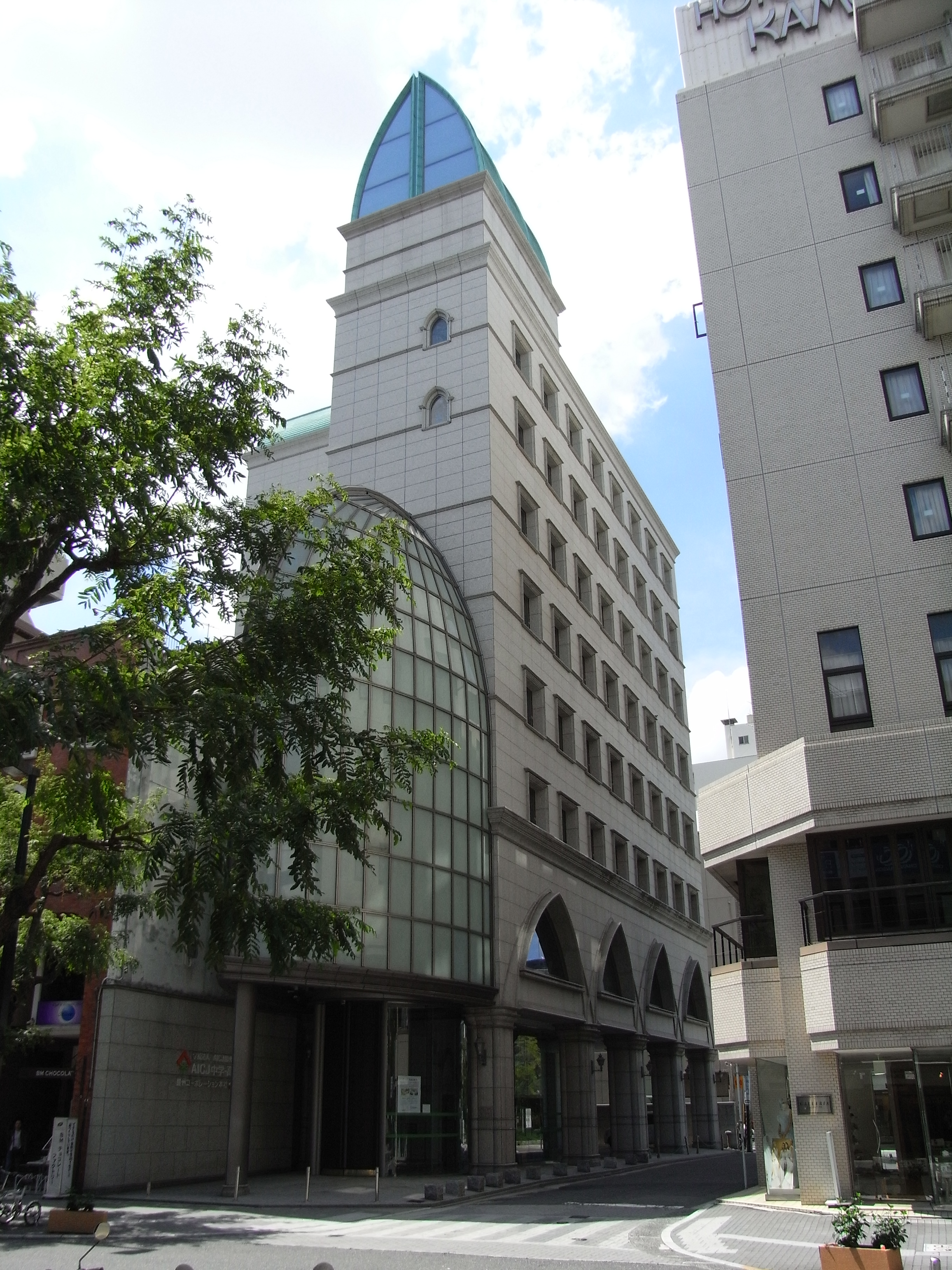 鴎州コーポレーション本社